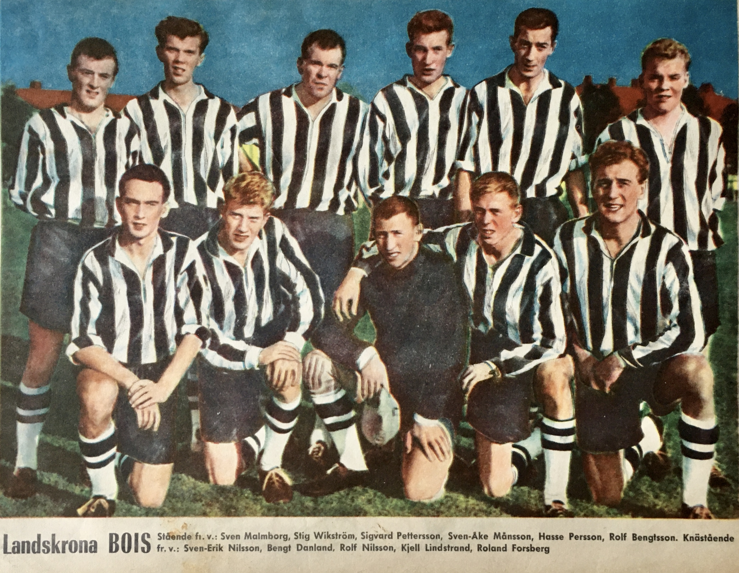 Landskrona BoIS 1960 med anfallarna Hasse "HP" Persson, Sigvard Pettersson och målvakten Rolf Nilsson.